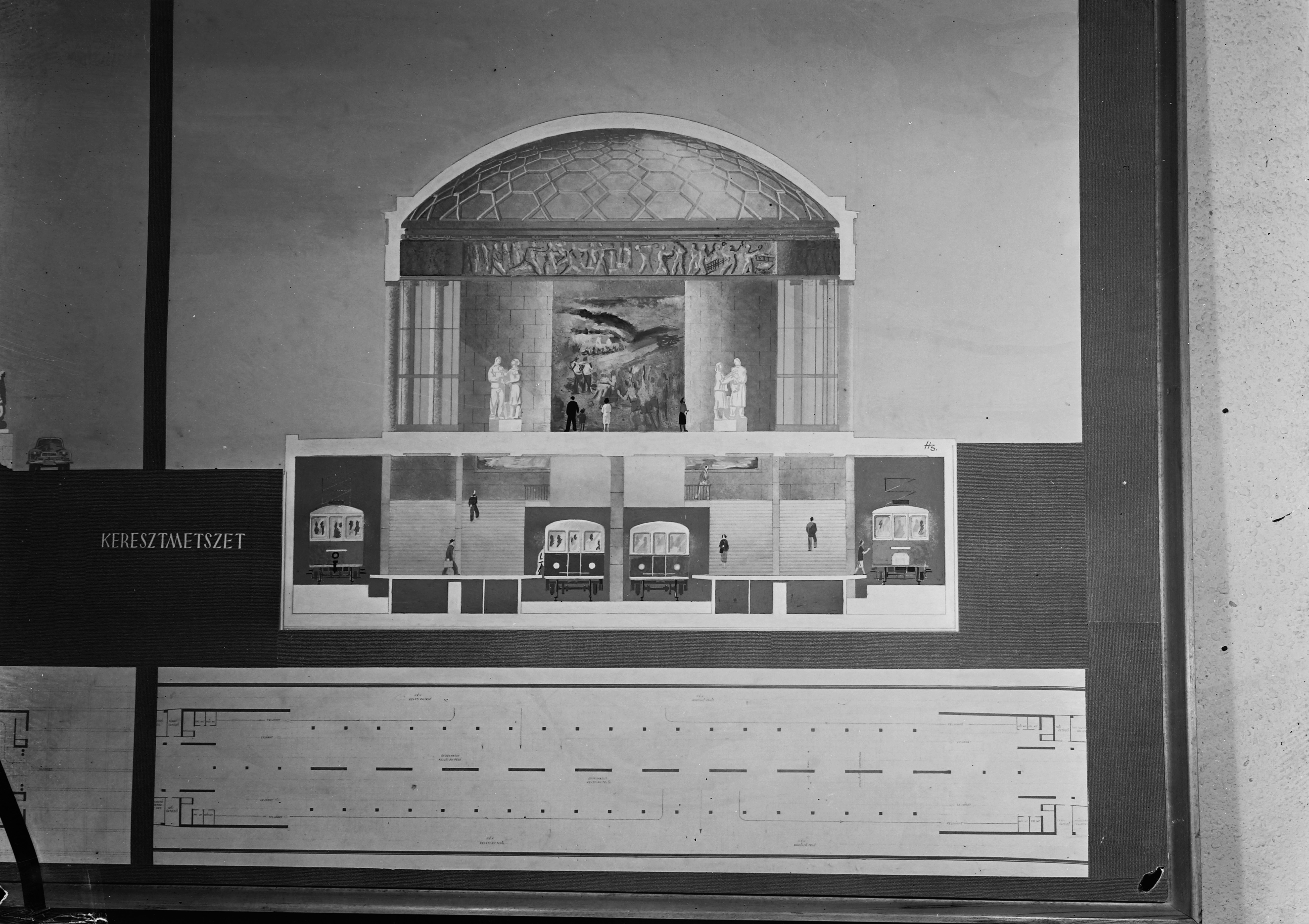 a metró és a gödöllői HÉV Hungária körúti, közös végállomásának terve. Location: Hungary, Budapest Title: a metró és a gödöllői HÉV Hungária körúti, közös végállomásának terve.